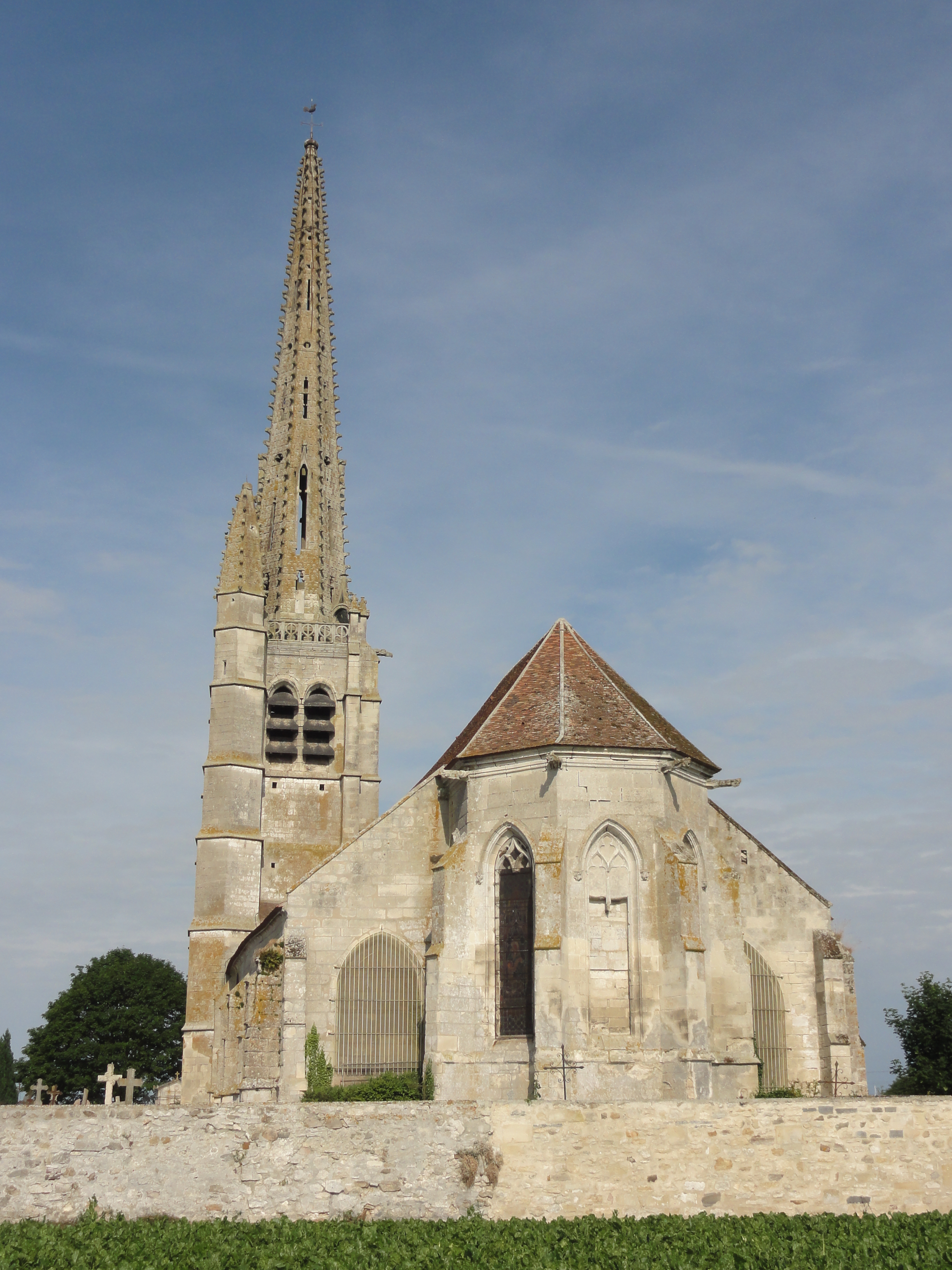 Église Sainte-Félicité de Montagny-Sainte-Félicité (voir titre).